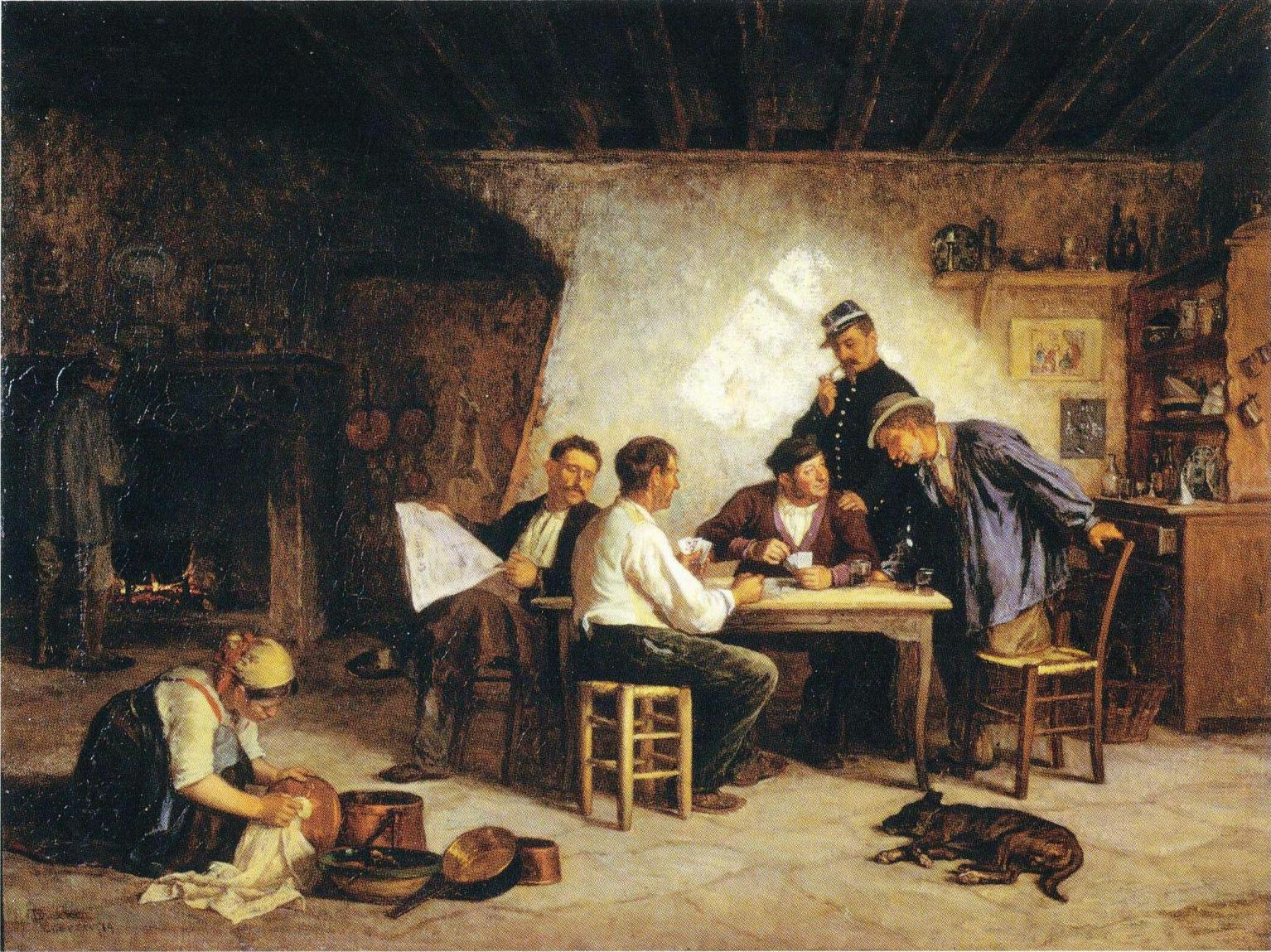 Adolf von Beckerin maalaus Pikettipeli.